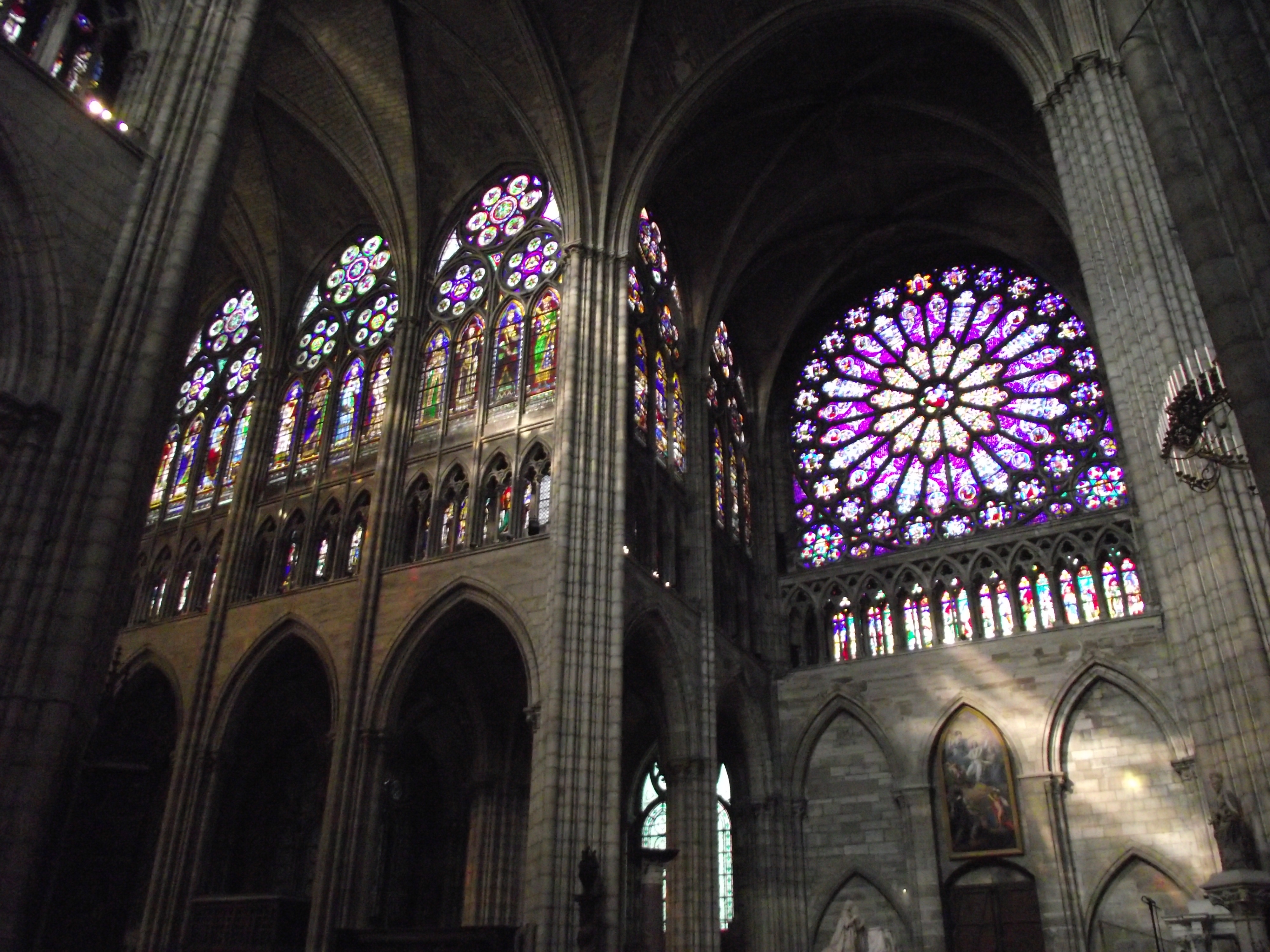 Basilique Sainte-Denis